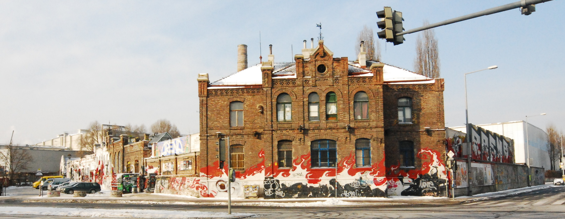 ehemaliger Schweineschlachthof in Sankt Marx (Wien)